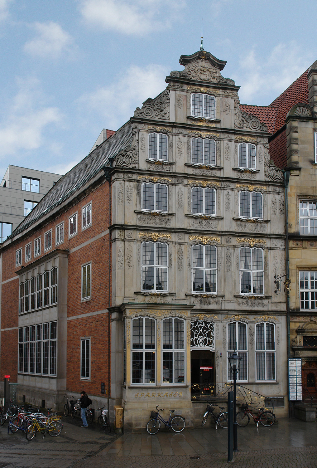 Bremer Marktplatz: Haus der Stadtsparkasse Das abgebildete Objekt ist ein geschütztes Kulturdenkmal in der Freien Hansestadt Bremen, mit der Nr. 0071 beim Landesamt für Denkmalpflege registriert.